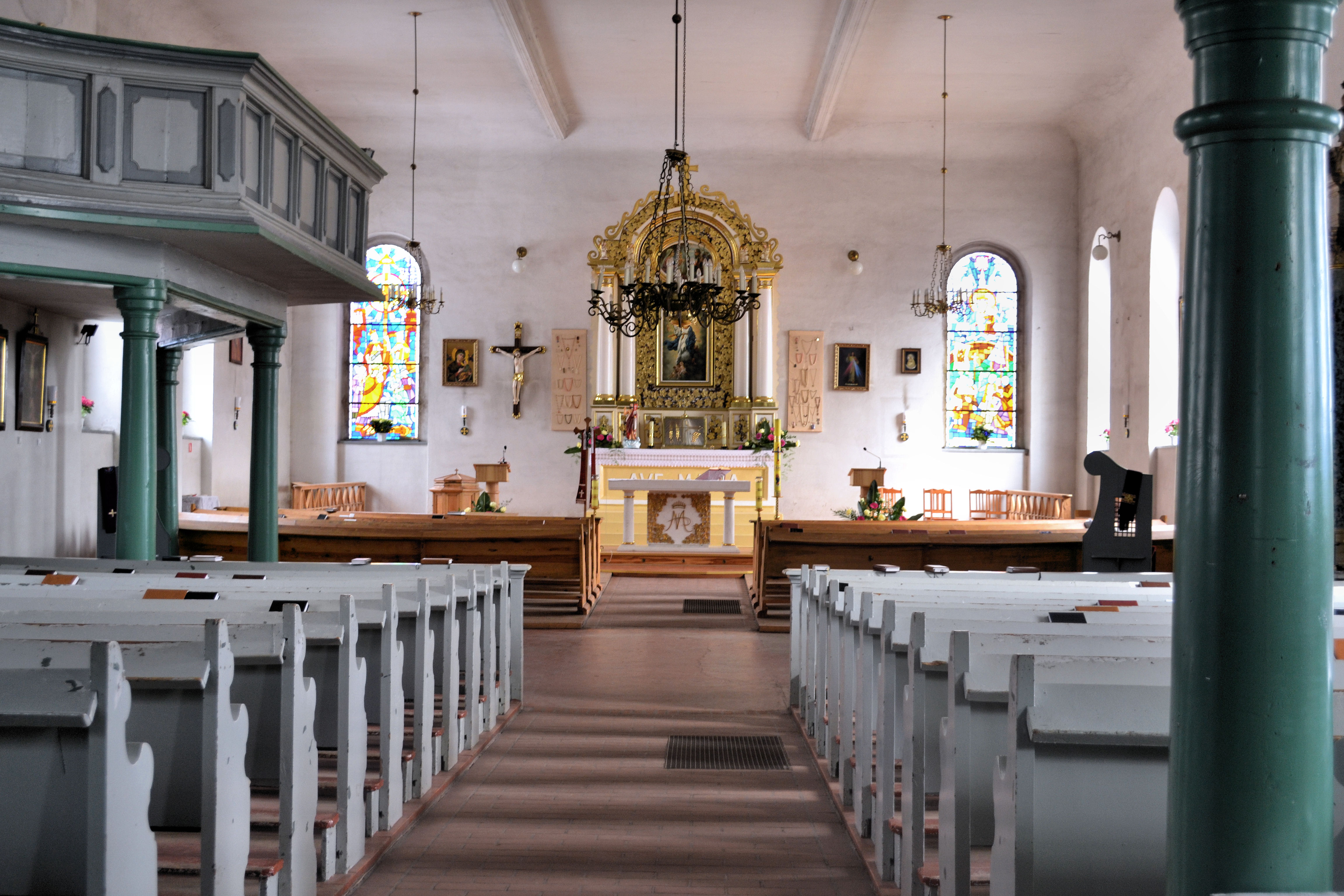 Kalisz Pomorski